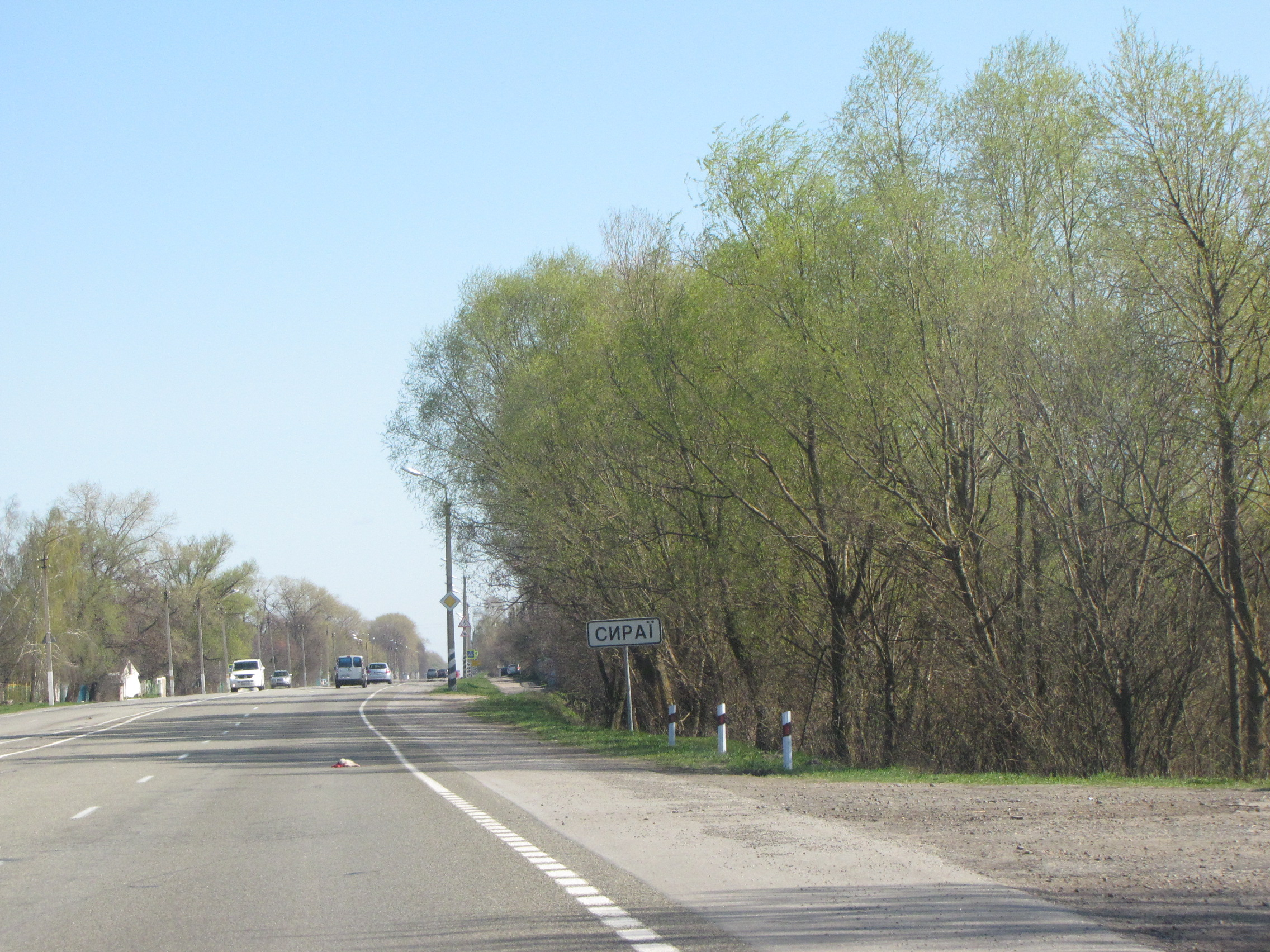 с. Сираї